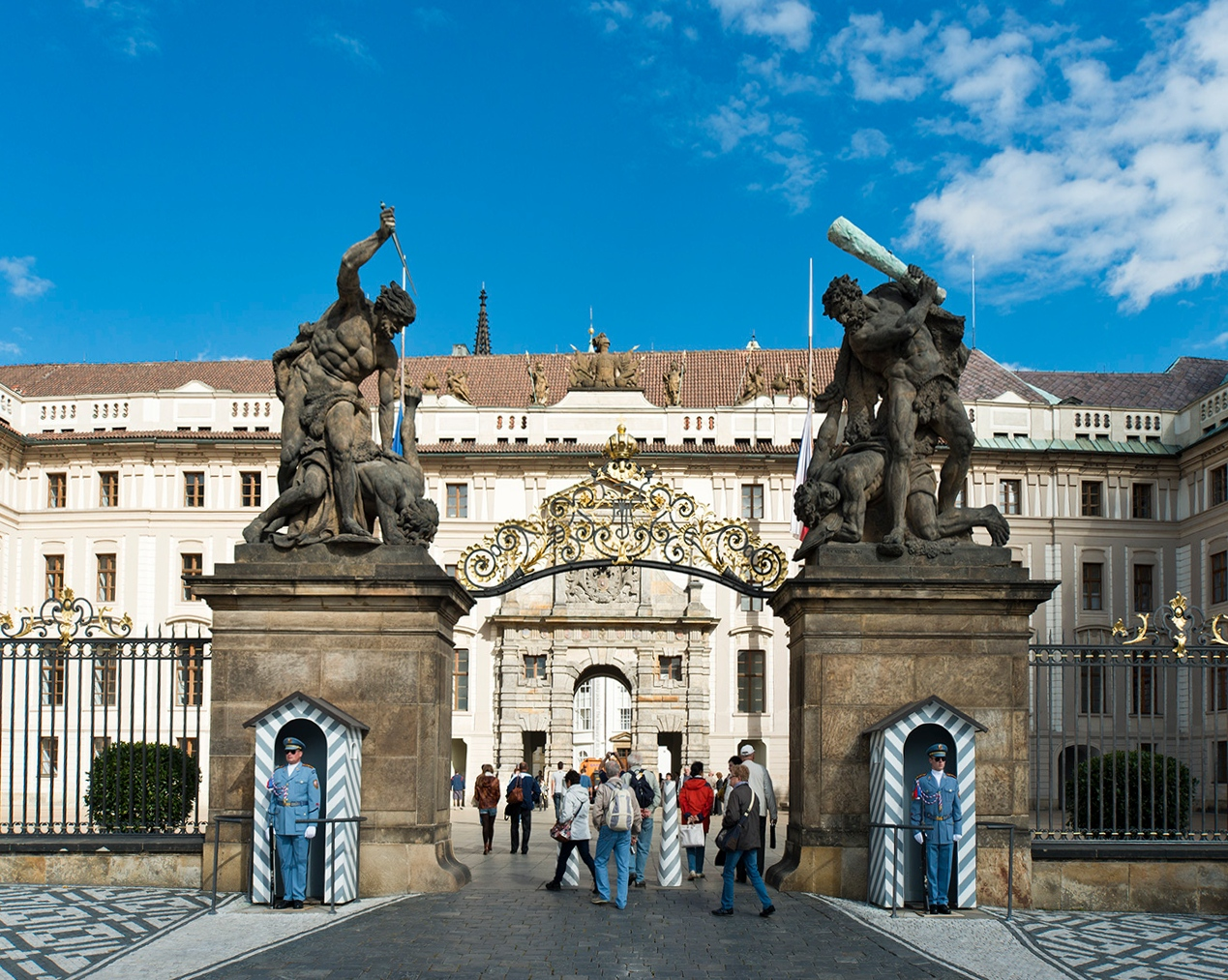 Prague Castle